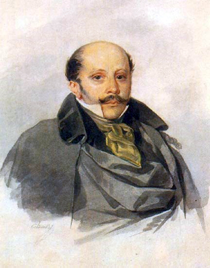 Чертков Александр Дмитриевич (1789-1858)-историк,археолог.